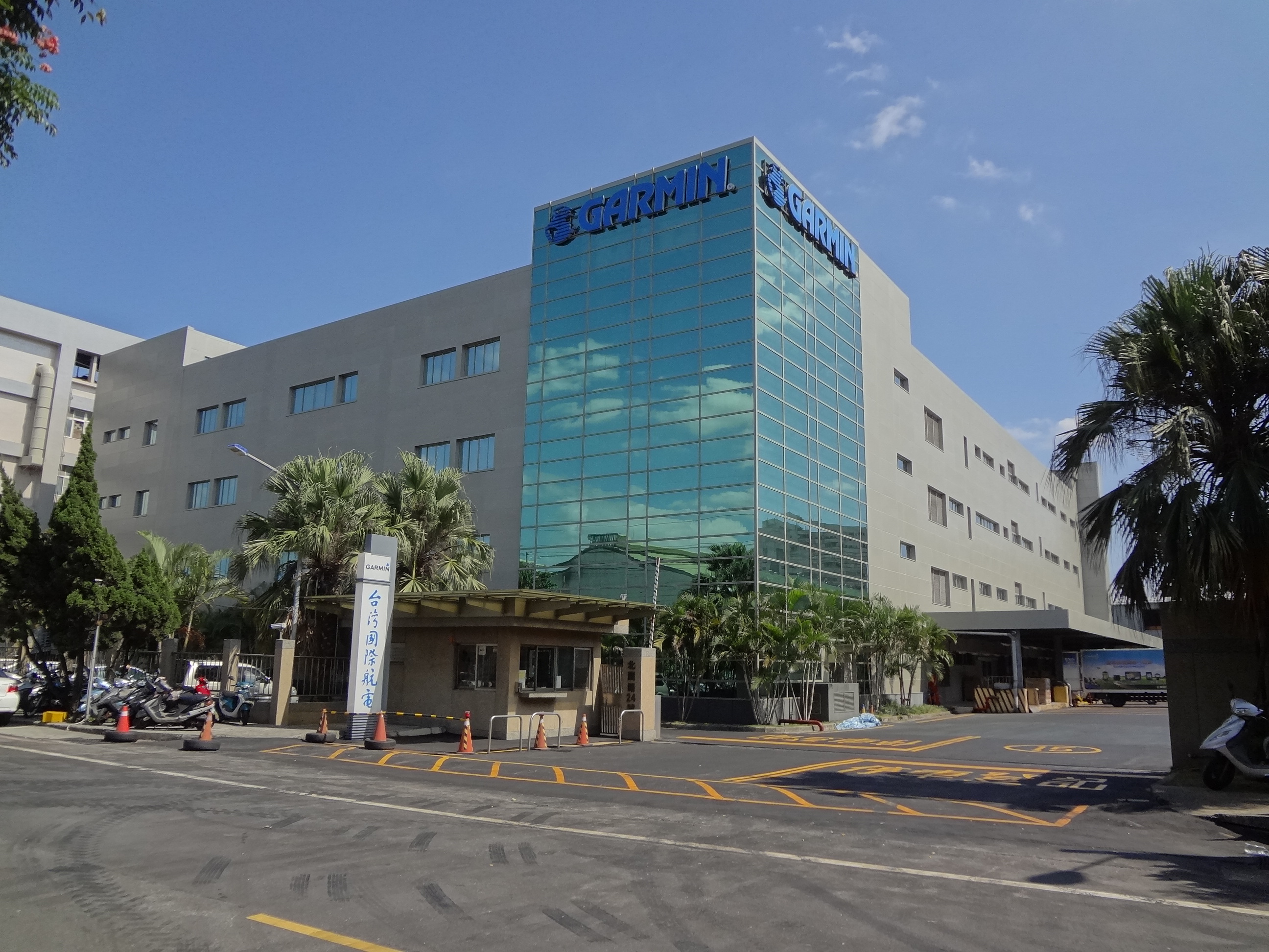 台灣國際航電中壢廠，地址：桃園縣中壢市北園路24號。